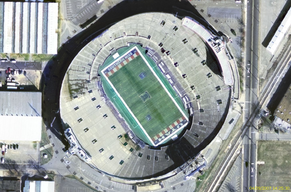 Image satellite du Liberty Bowl Memorial Stadium.